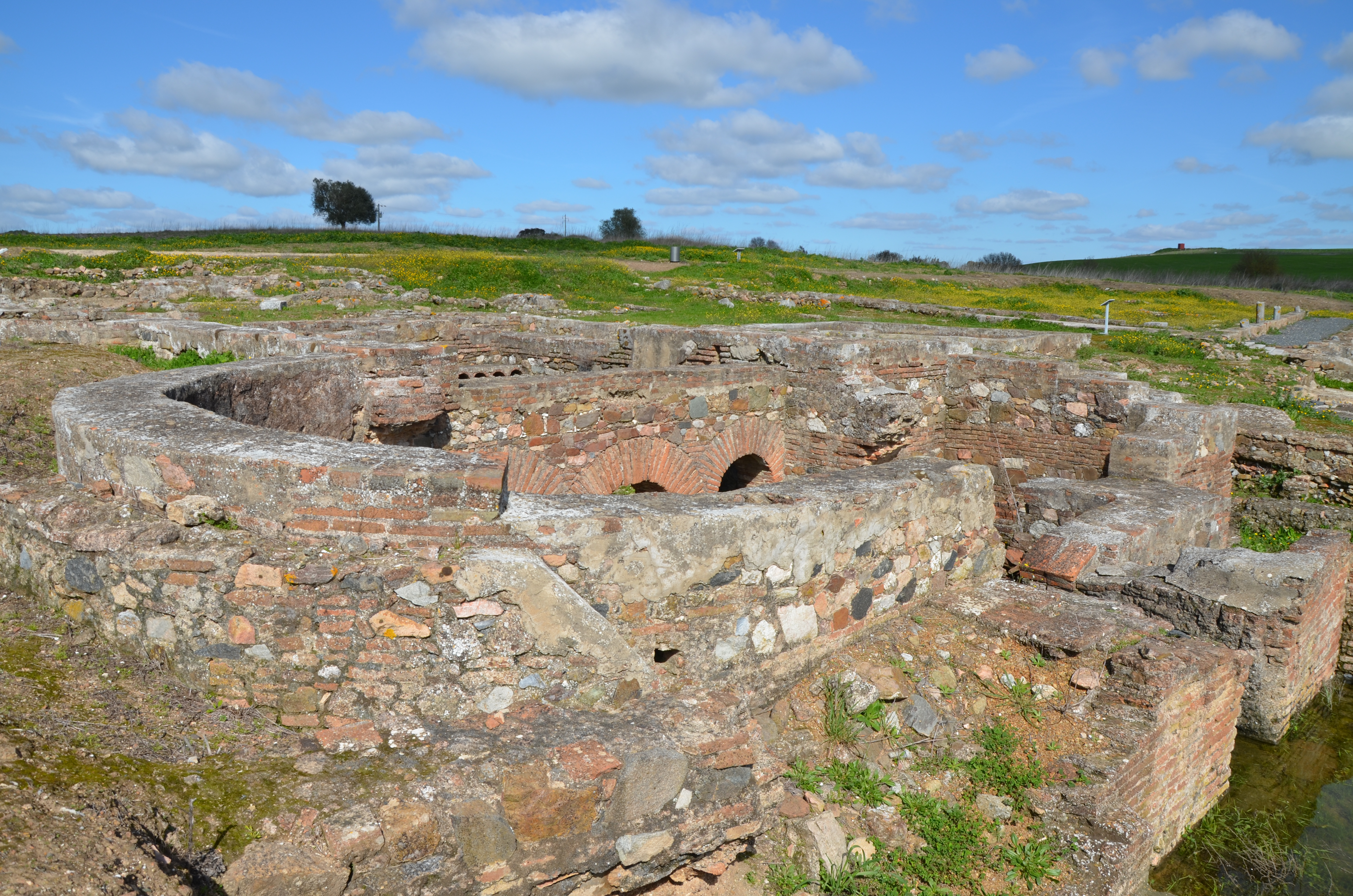 Roman Villa of Pisões, Portugal Roman villa, Pisões